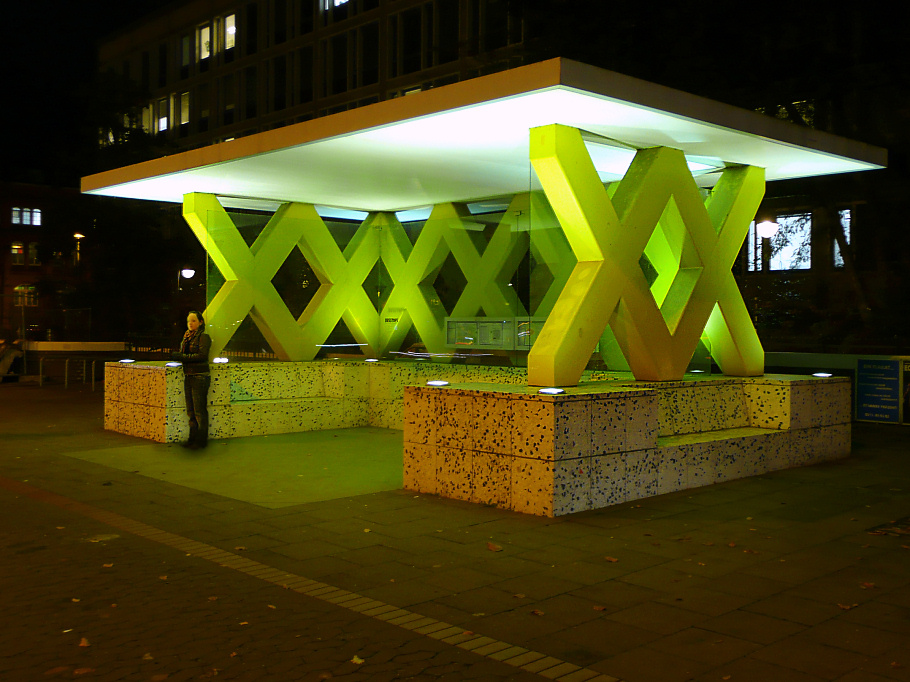 BUSSTOPS Hanover Haltstelle Königsworther Platz